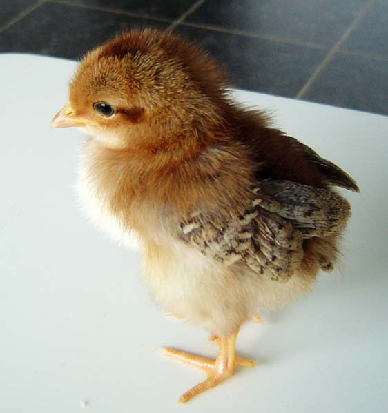 kuiken Leghorn 2 weken oud eigen foto Categorie:Afbeelding vogel